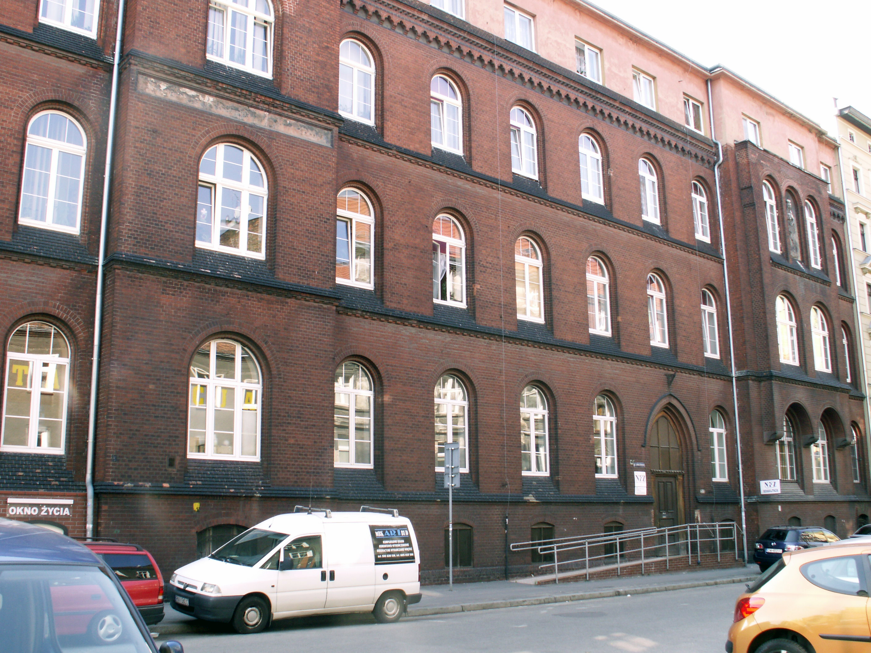 Wrocław, zespół szpitala św. Jerzego, ob. zakład leczniczo-opiekuńczy, pocz. XX